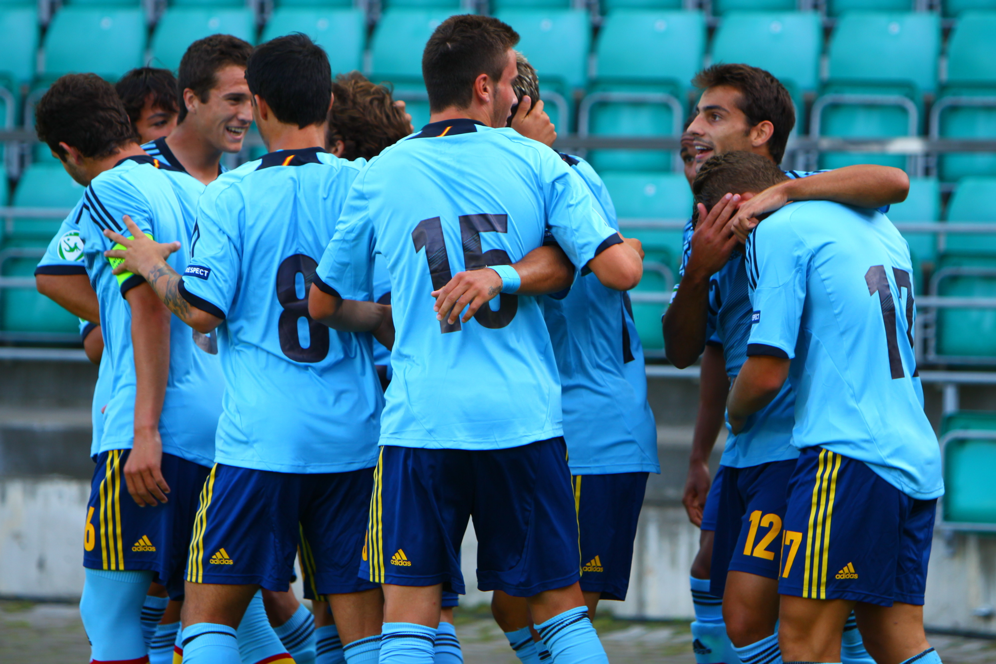 U-19 Portugal vs Spain.